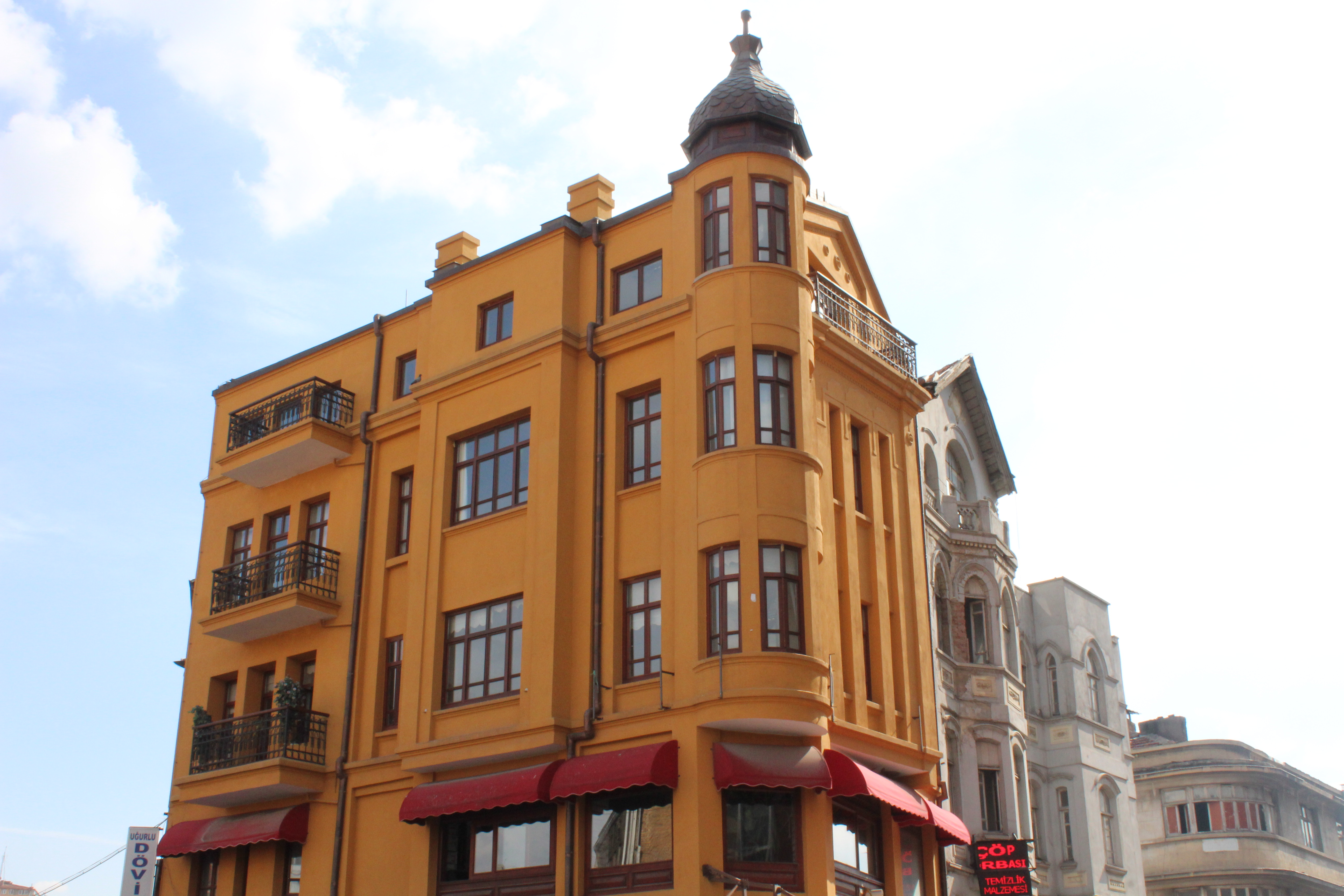 Erzurum Oteli, 2019